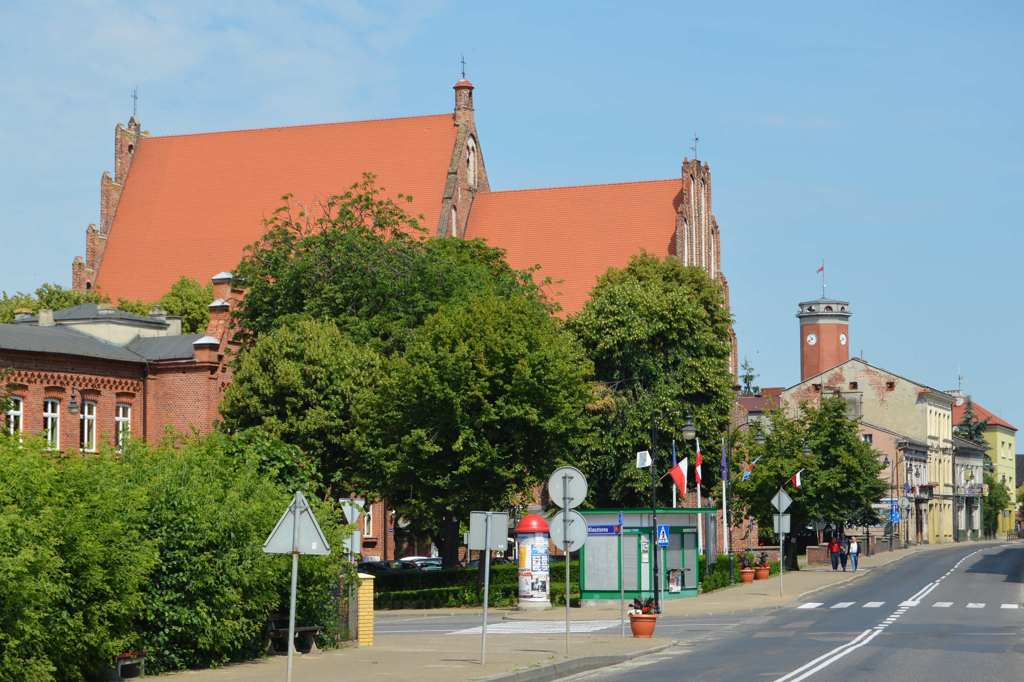 Zabudowa ulicy Adama Mickiewicza w Kole. Od lewej widoczne: budynek Urzędu Miejskiego (XIX wiek), kościół Podwyższenia Krzyża Świętego (XV wiek), wieża ratusza miejskiego (XVI wiek, odbudowana współcześnie).